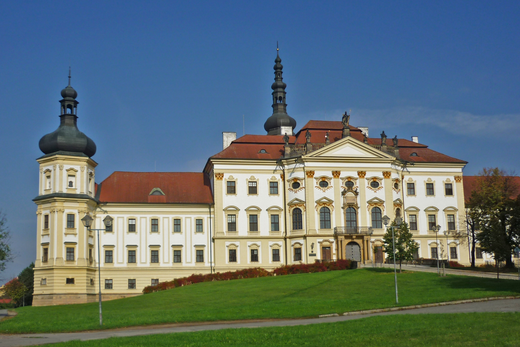 Kloster Hradisch (Hradisko) in Olmütz (Olomouc) in Mähren